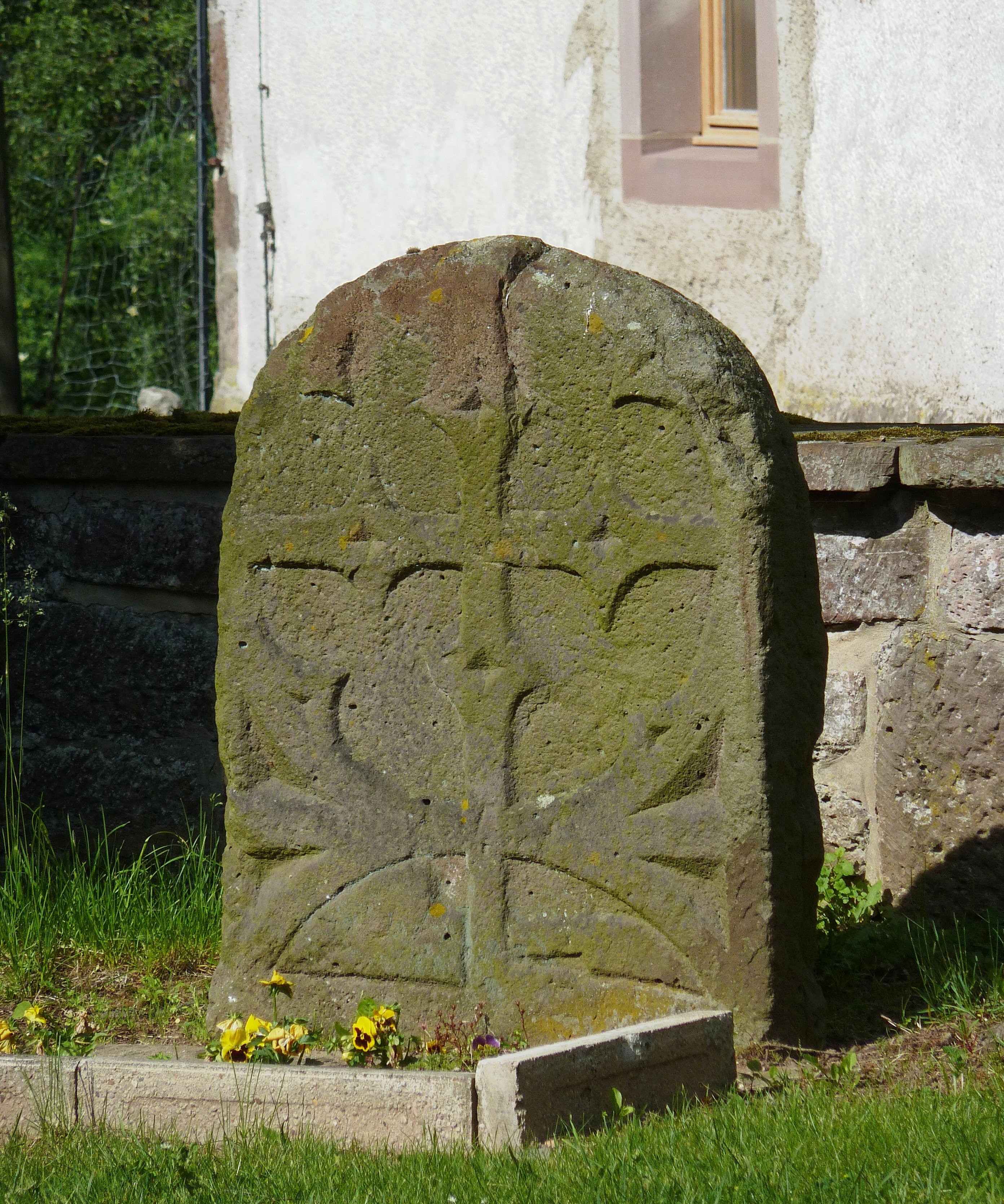 Kreuzstein in Mackensen, Stadt Dassel, Landkreis Northeim, Niedersachsen. Heutiger Standort bei der Kirche, gefunden 1978